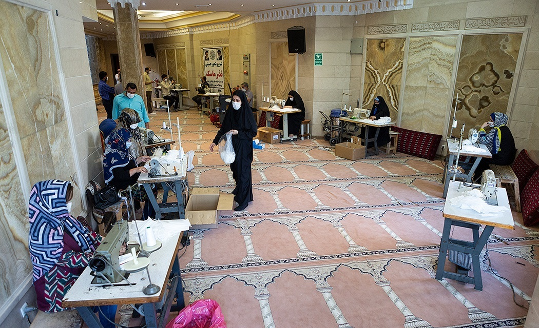 یک کارگاه دوخت ماسک در پی تشدید همه‌گیری کروناویروس در ایران مرداد 1399